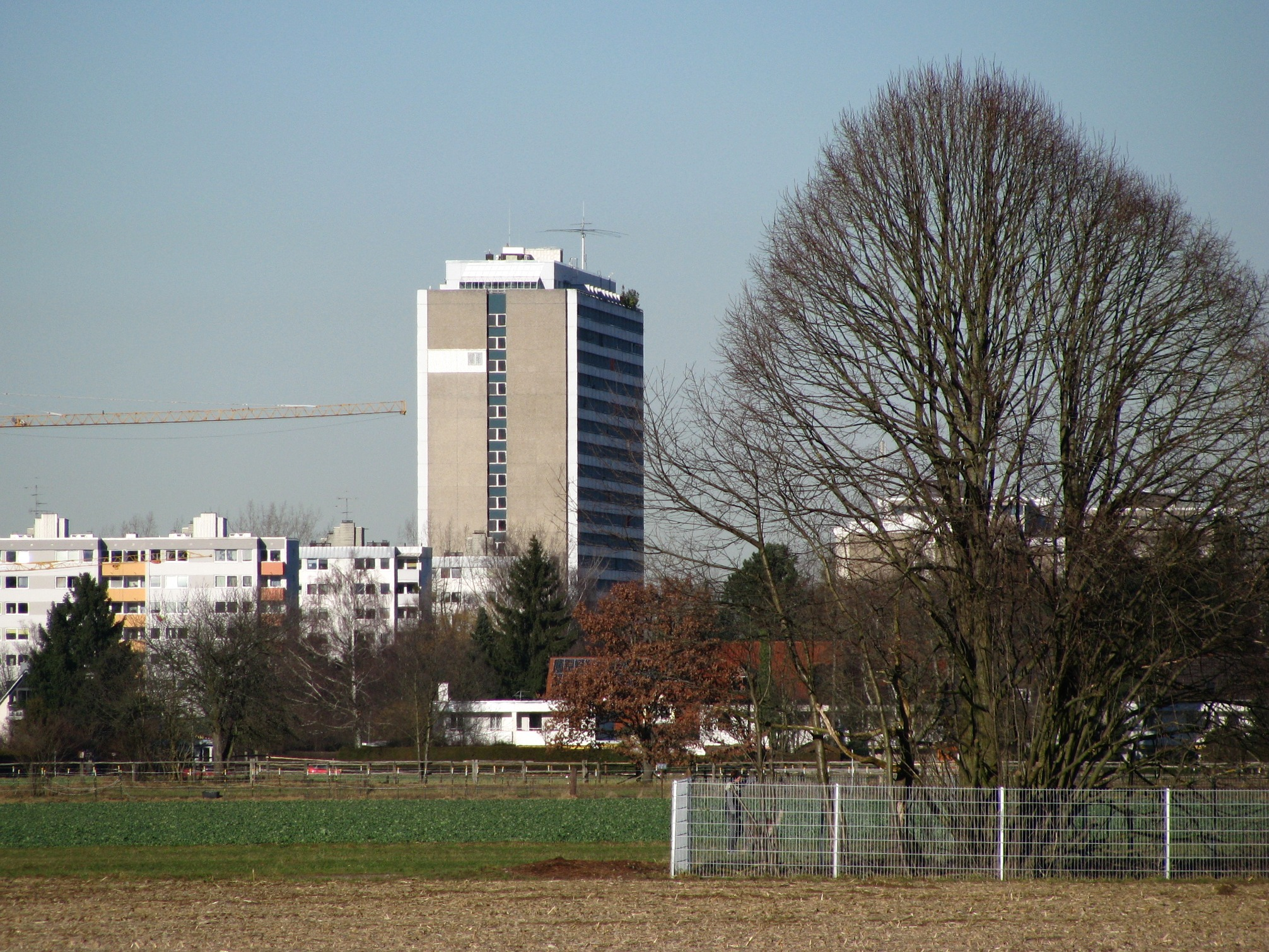 Sog. DEBA-Hochhaus (Drygalski-Allee 118) am Rande der Parkstadt Solln in München.